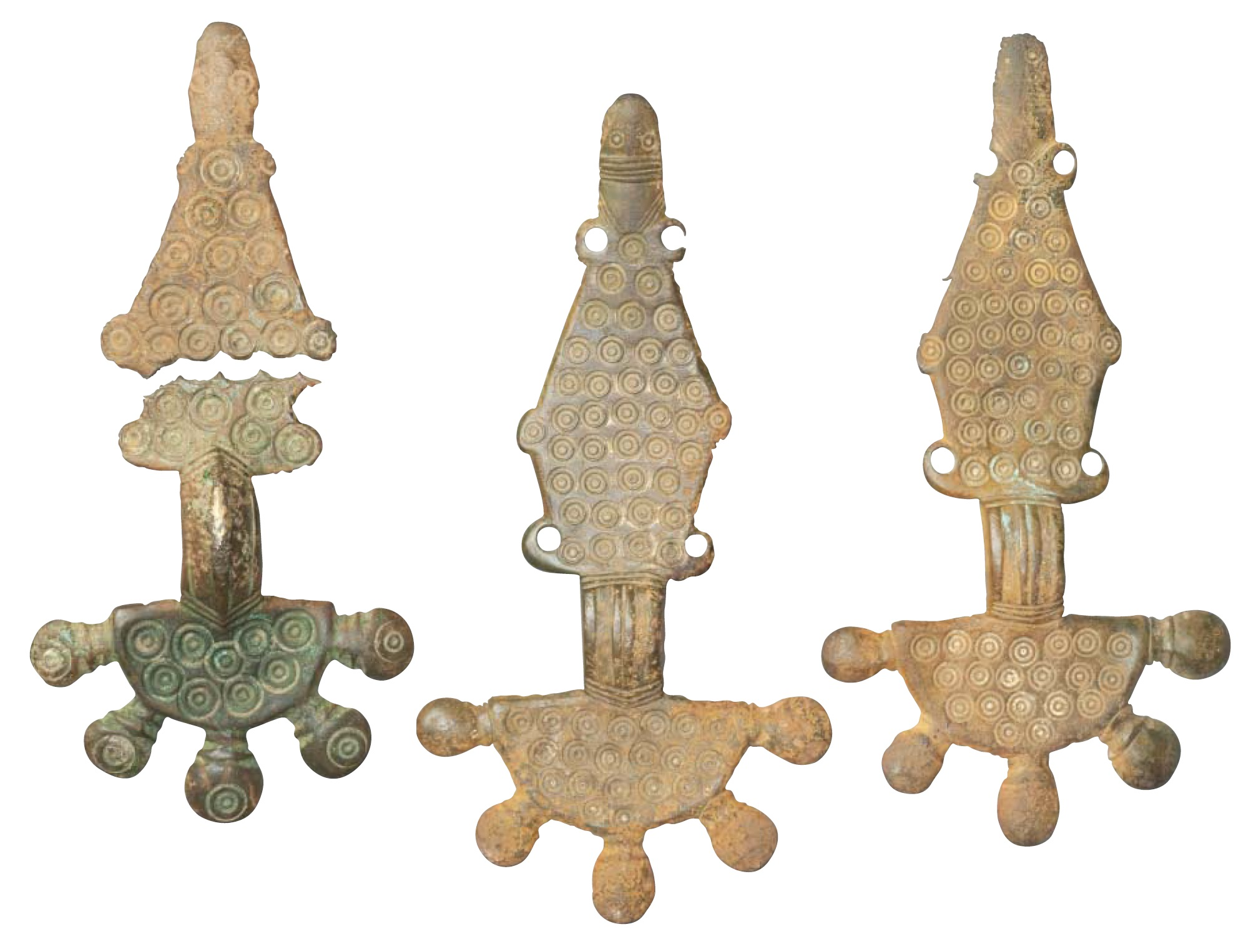 Три фибулы из Колосковского клада. Бронза, литье. Щитки фибул полукруглой формы с пятью выступами. Ножки ромбовидной формы с шестью выступами. Концы ножек оформлены стилизованной мордой зверя. Инвентарные номера: ГИМ 35107. Оп. Б 939/7. ГИМ 35107. Оп. Б 939/8. ГИМ 35107. Оп. Б 939/9.